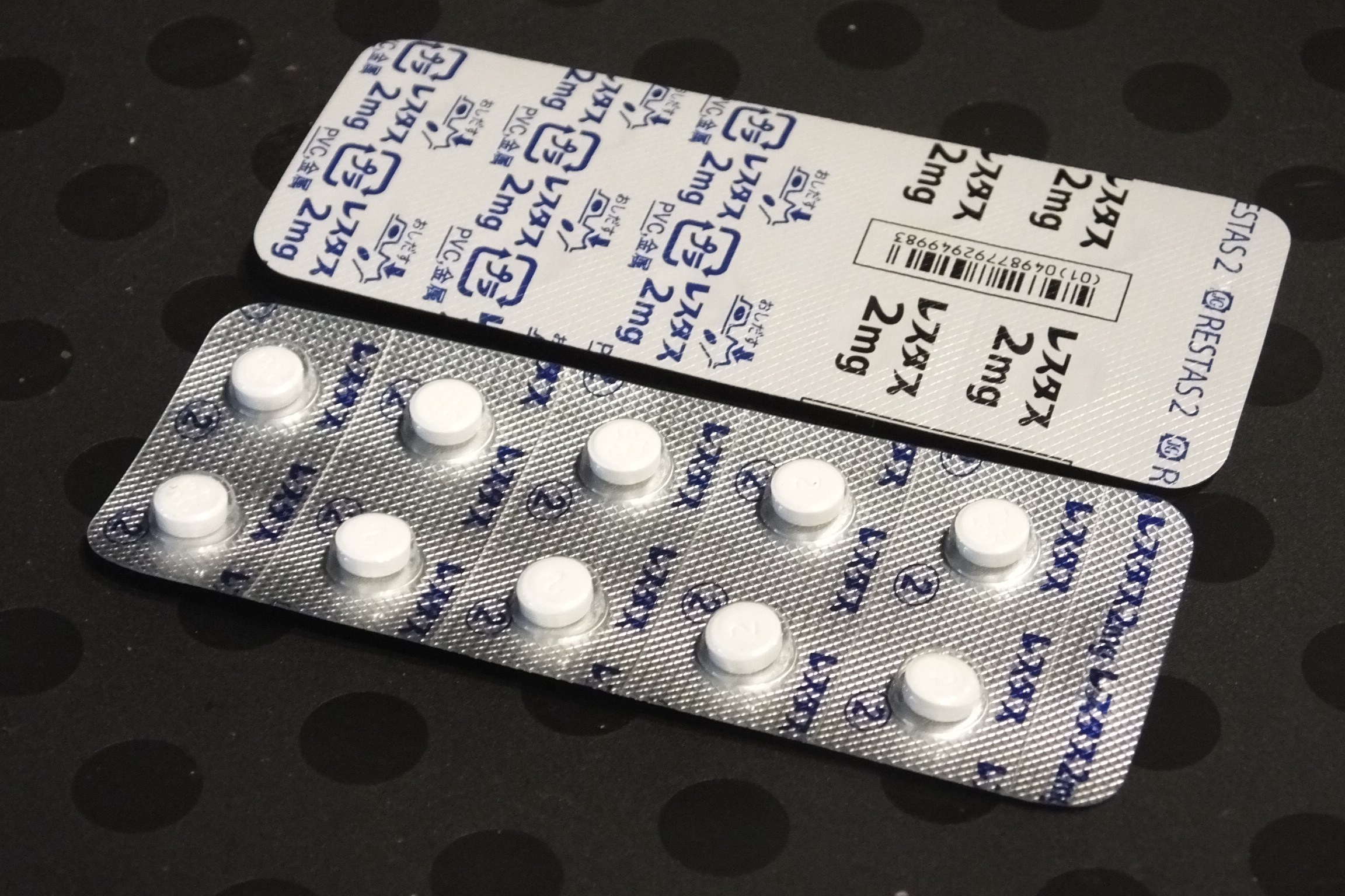 NIHON GENERIC CO., 適用 心身症、神経症などにおける不安、緊張、抑うつ、易疲労性、睡眠障害 高血圧症、胃潰瘍・十二指腸潰瘍、慢性胃炎、過敏性腸症候群における身体症候、不安、緊張、抑うつ、易疲労性、睡眠障害 Flutoprazepam (Restas) is a drug which is a benzodiazepine. It was patented in Japan by Sumitomo in 1972and its medical use remains mostly confined to that country. Its muscle relaxant properties are approximately equivalent to those of diazepam - however, it has more powerful sedative, hypnotic, anxiolytic and anticonvulsant effects and is around four times more potent by weight compared to diazepam. It is longer acting than diazepam due to its long-acting active metabolites,which contribute significantly to its effects.